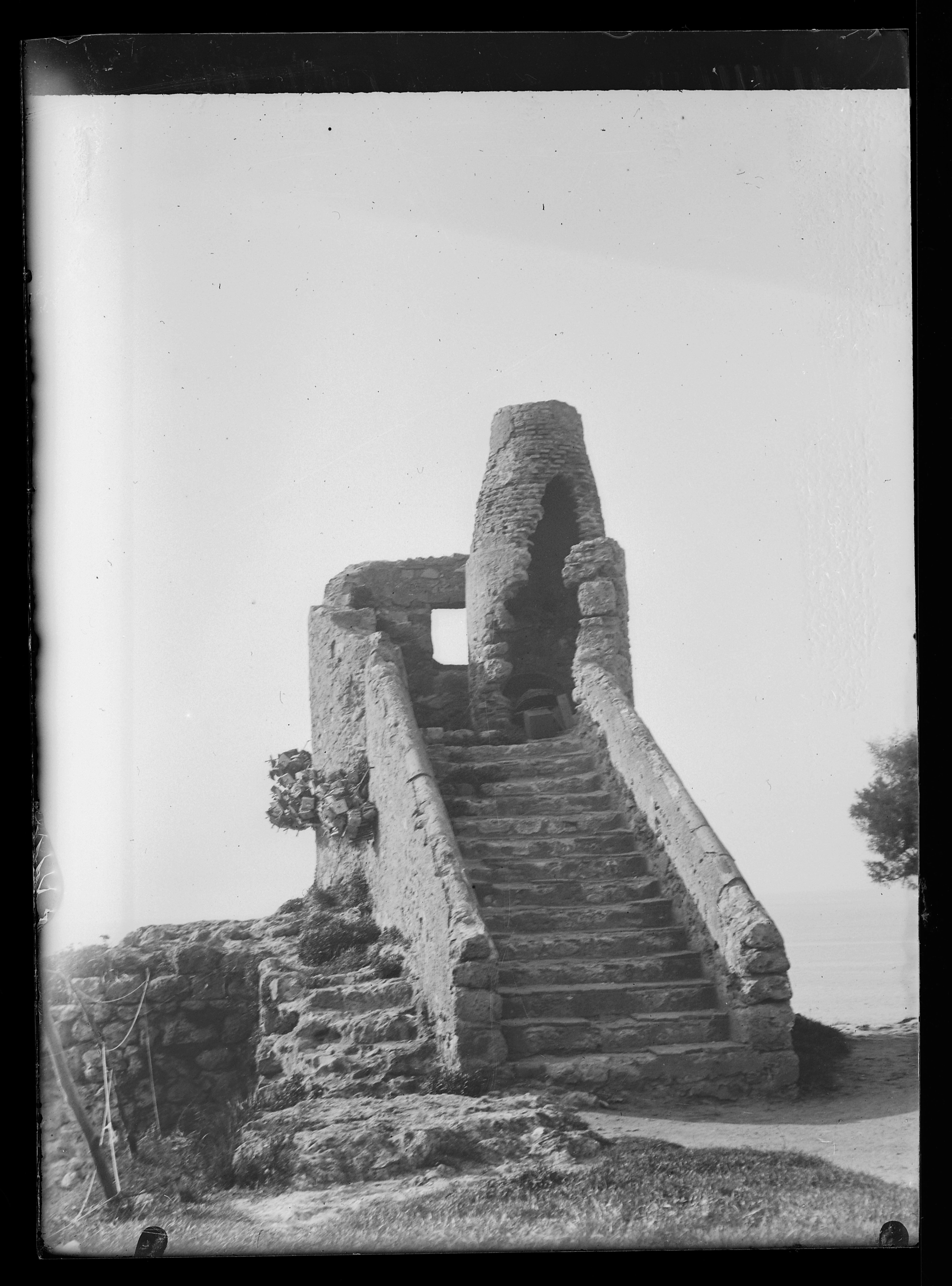 Inscription manuscrite par Eugène Trutat sur l'enveloppe : "Biarritz ancien phare de l'Atalaye"